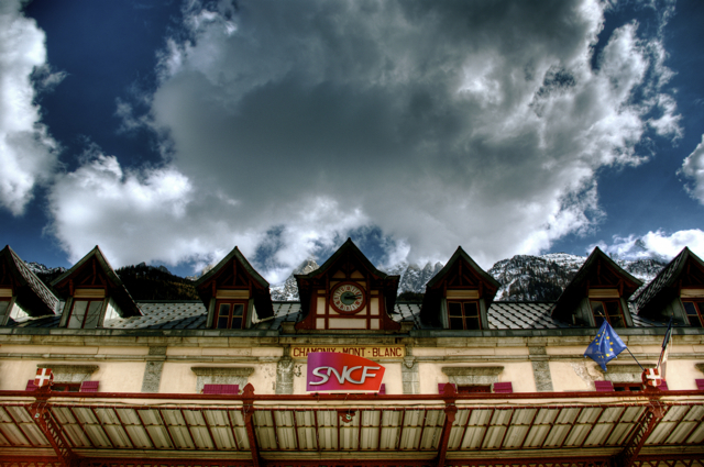 Gare de chamonix